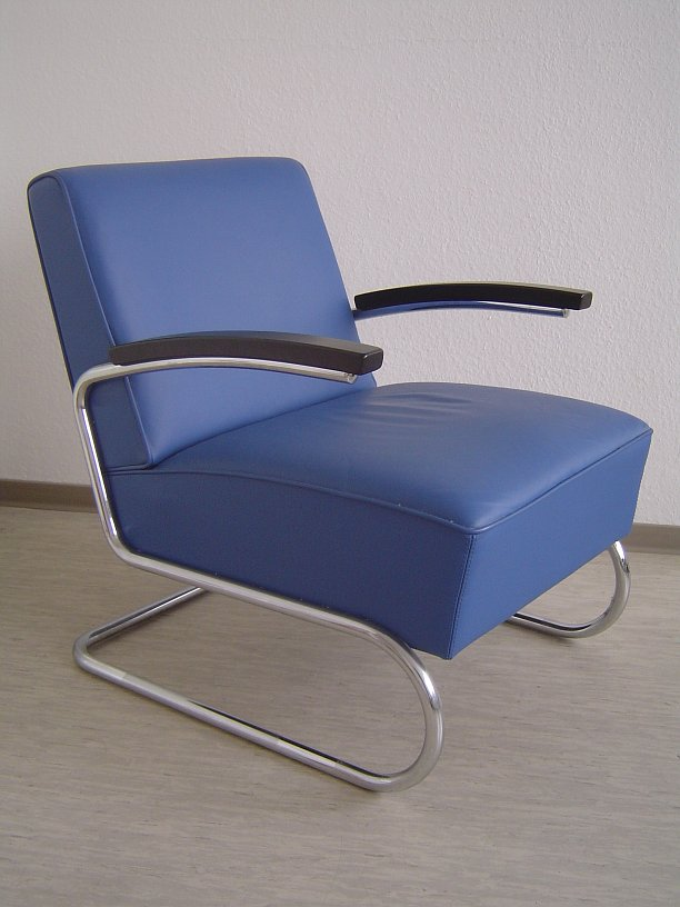 Freischwinger (Sessel) S 411 von Thonet